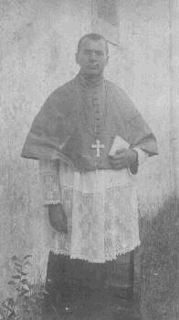 Ferdinand Hrdý (1872 - 1949), Český římskokatolický kněz.